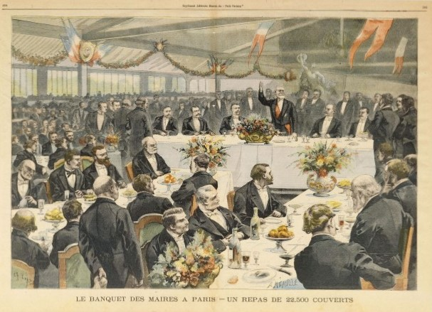 Banquet des maires à Paris. Un repas de 22 500 couverts (défet de presse, suppl. ill. du Petit Parisien)